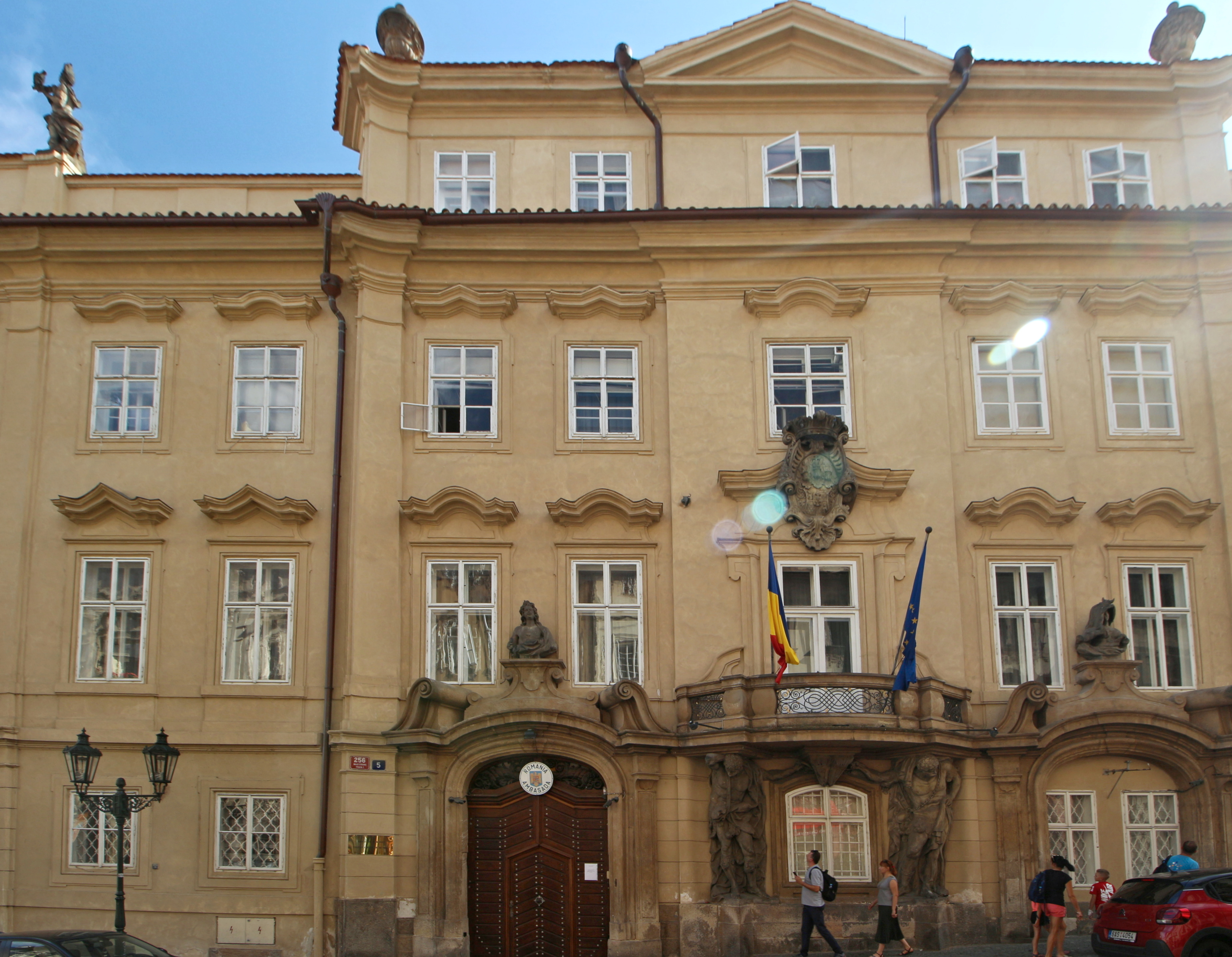 Praha 1-Malá Strana, Nerudova ulice